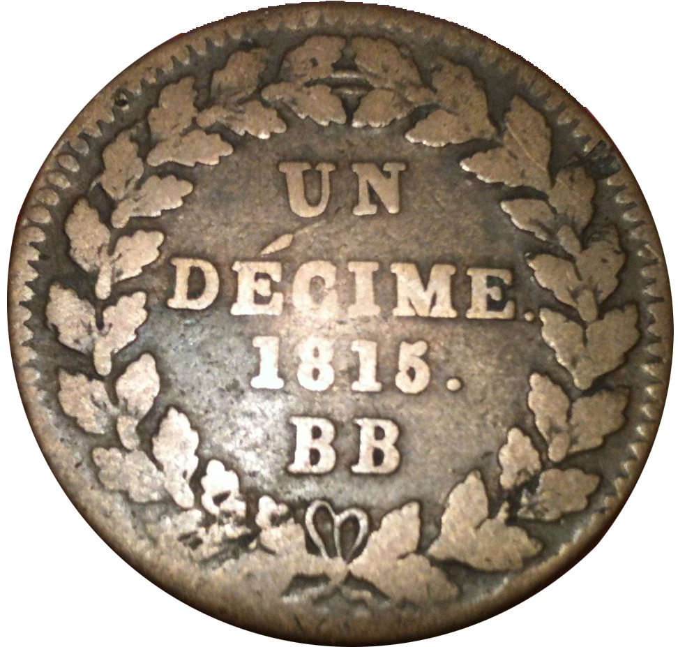 Revers d'une pièce de 1 décime Louis XVIII émise en 1815